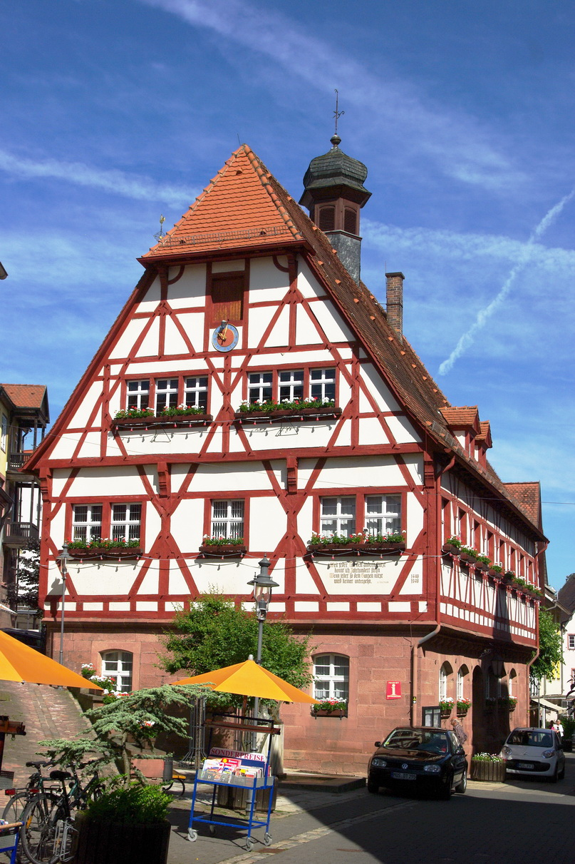 Rathaus Walldüen